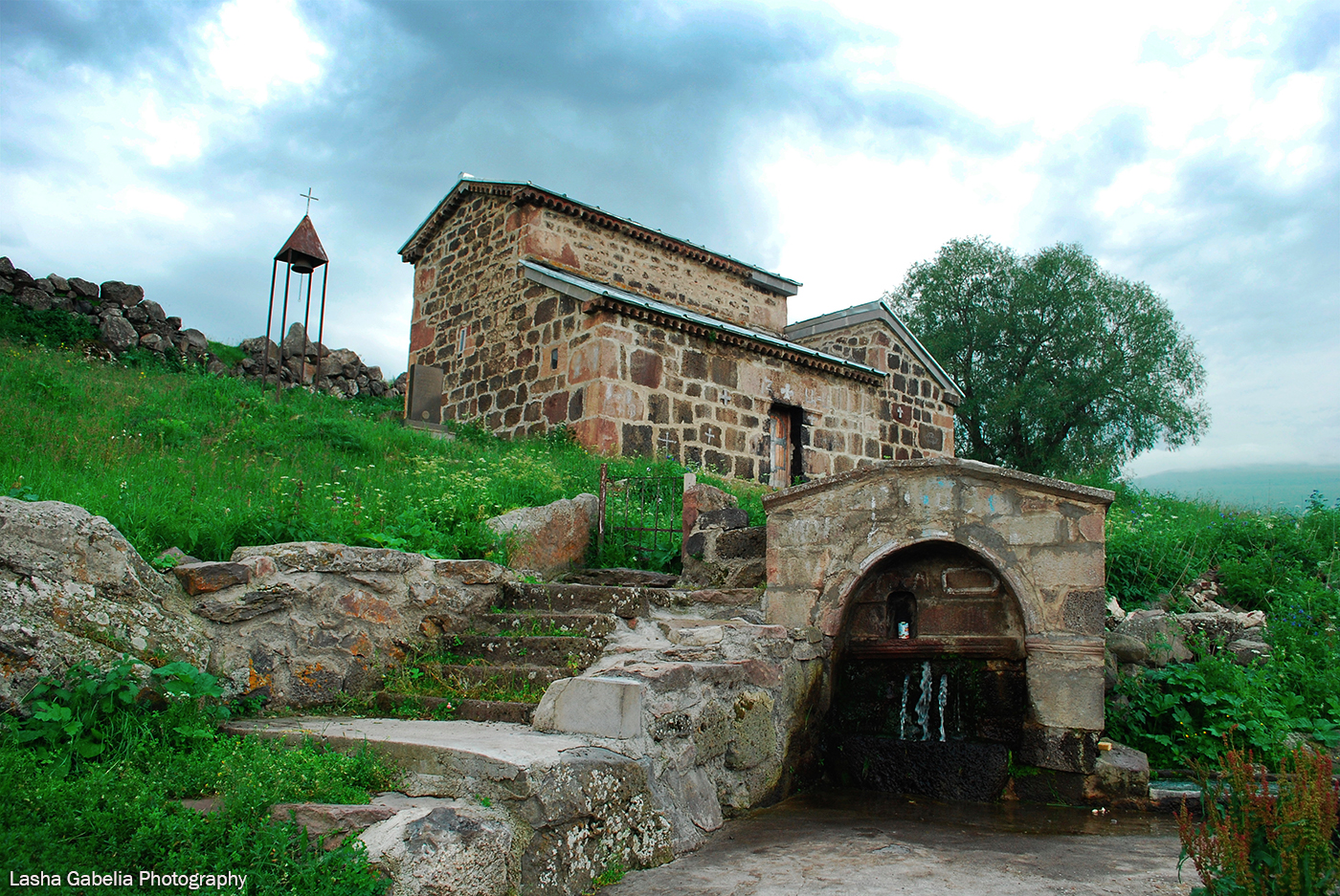 აიაზმის ღვთისმშობლის ეკლესია